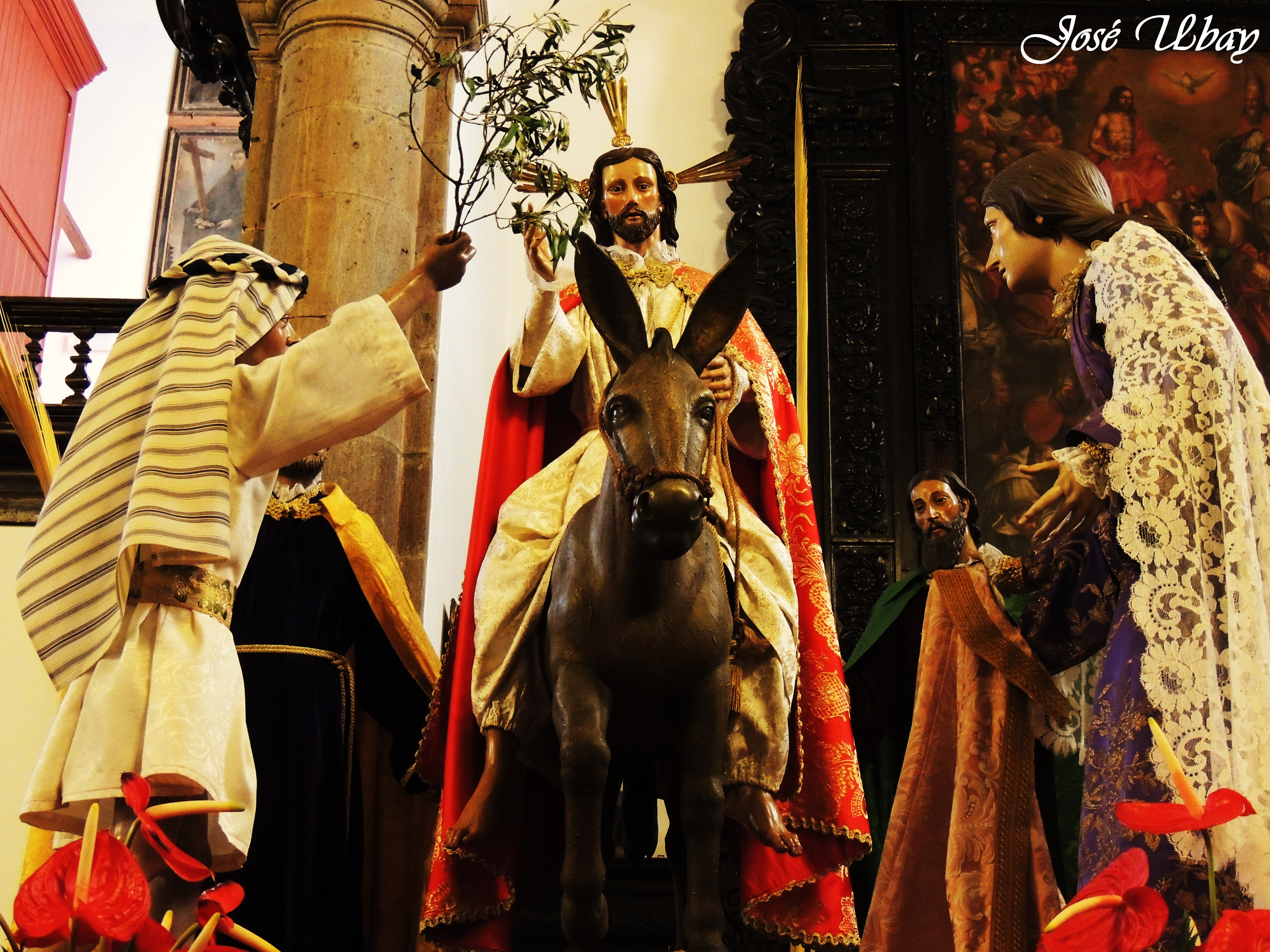 Paso procesional de la Sagrada Entrada Triunfal en Jerusalén. Parroquia Matriz de Nuestra Señora de la Concepción. San Cristóbal de La Laguna.